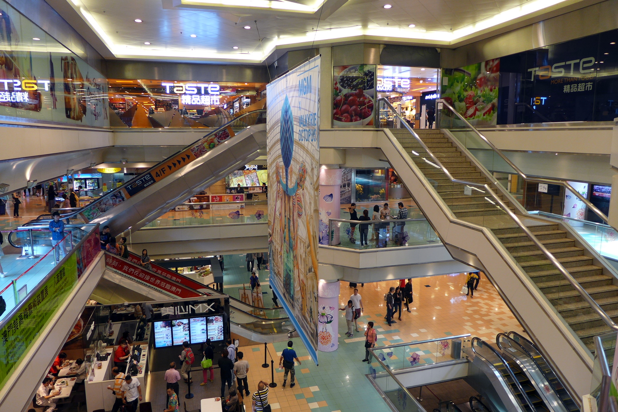 Shun Tak Centre West Void